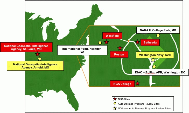 NGA sites